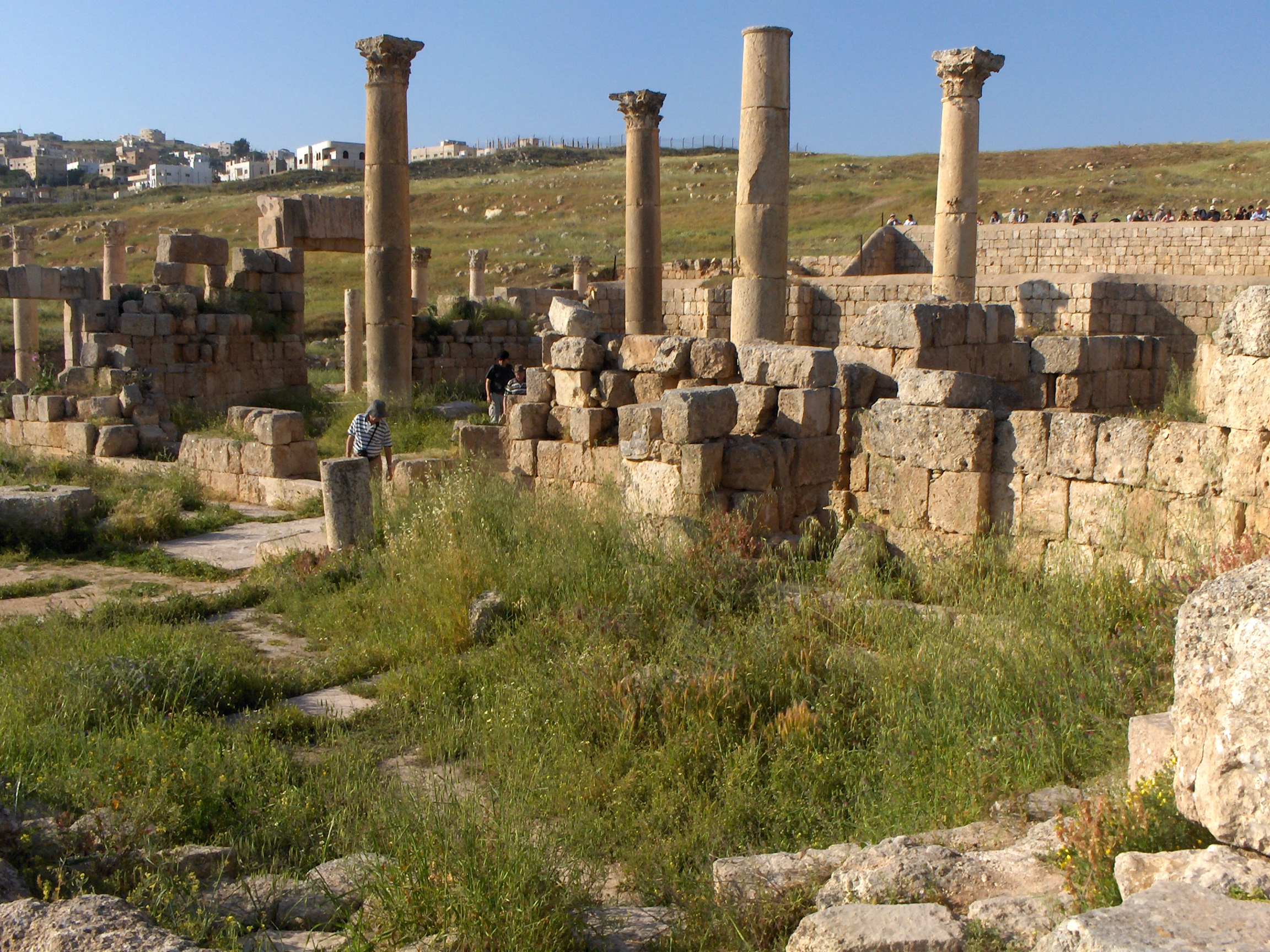 Il complesso delle tre chiese di Jerash, Giordania